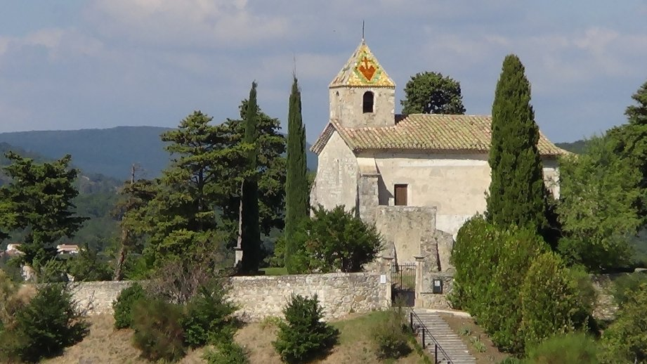 classée aux Monuments historiques